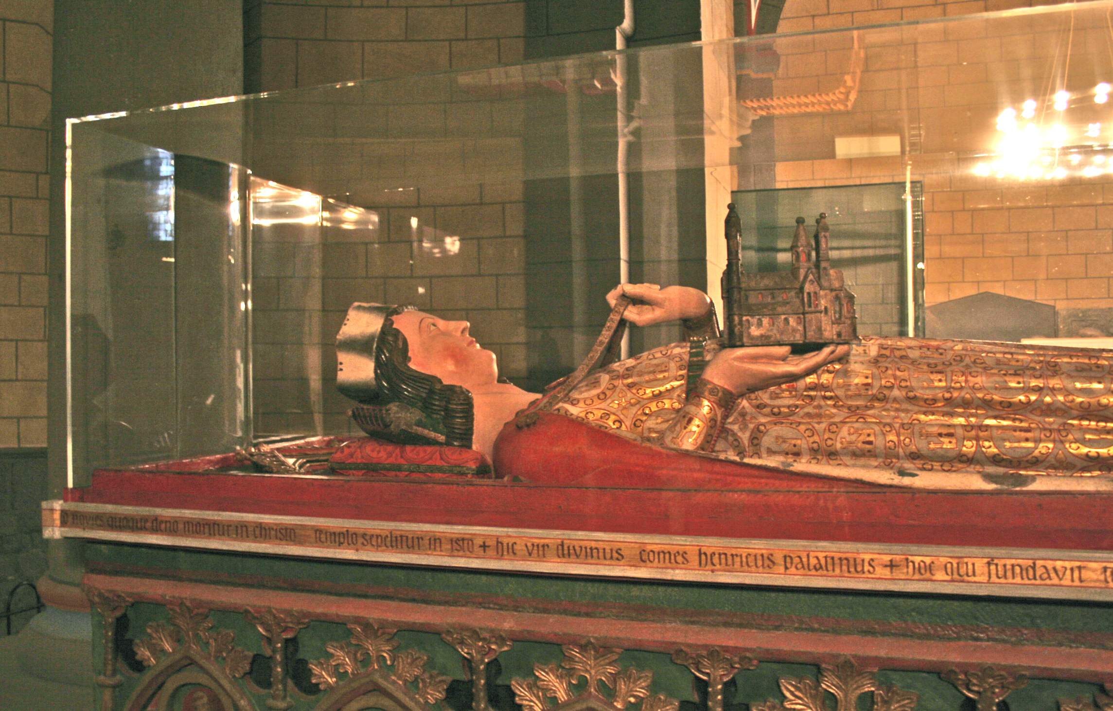 Graf vum Pfalzgraf Heinrich II. vu Laach.